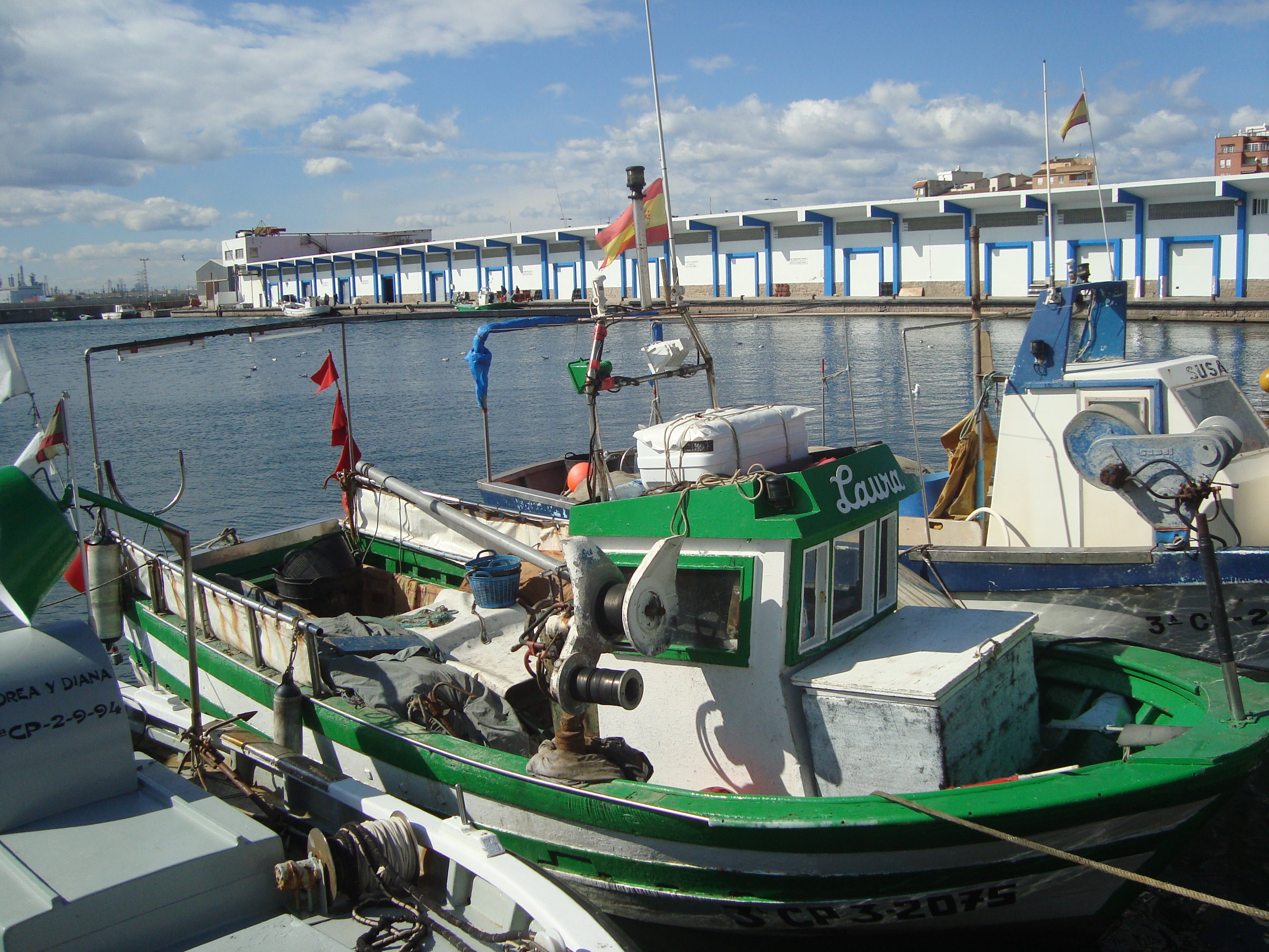 Port pesquer del Grau de Castelló